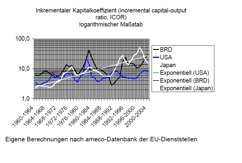 Inkrementaler Kapitalkoeffizient, incremental capital-output ration ICOR,1960 bis 2004, USA, BRD und Japan